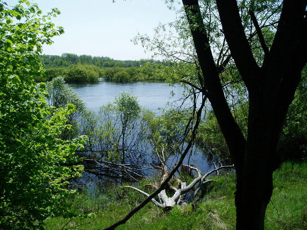 Рака Іпуць у вёсцы Вылева Добрушскага раёна